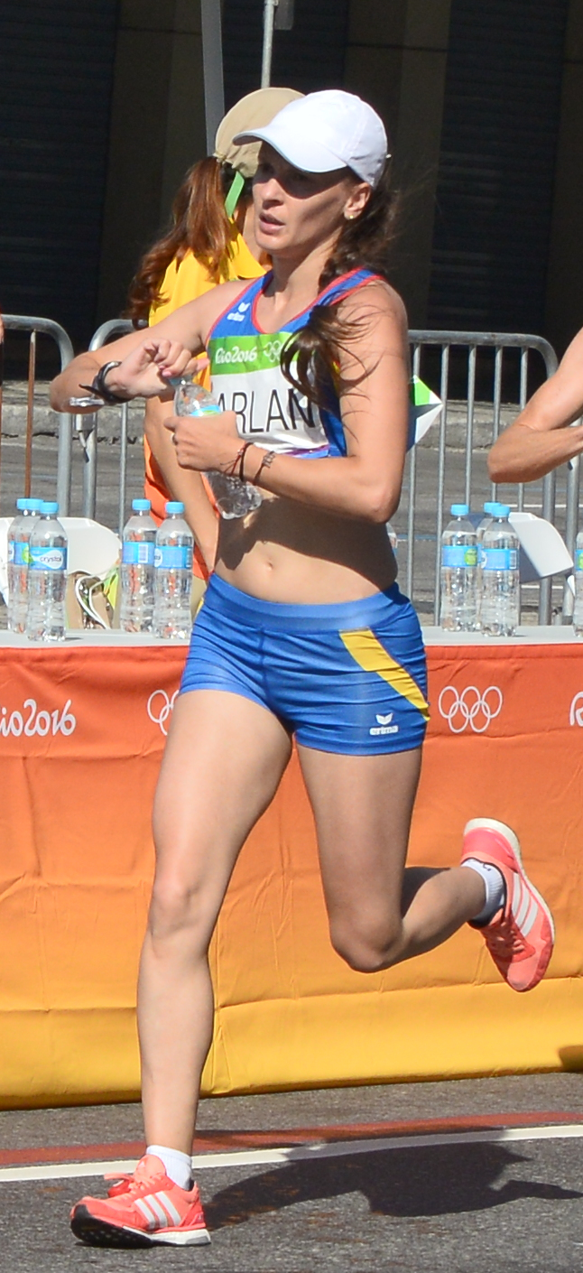 Passage du marathon des jeux olympiques de Rio 2016 dans le centre de Rio